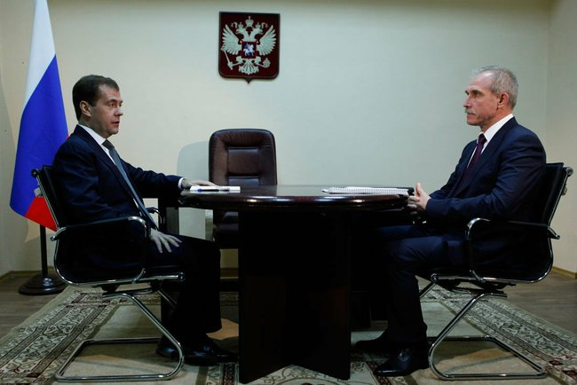 С губернатором Ульяновской области Сергеем Морозовым.